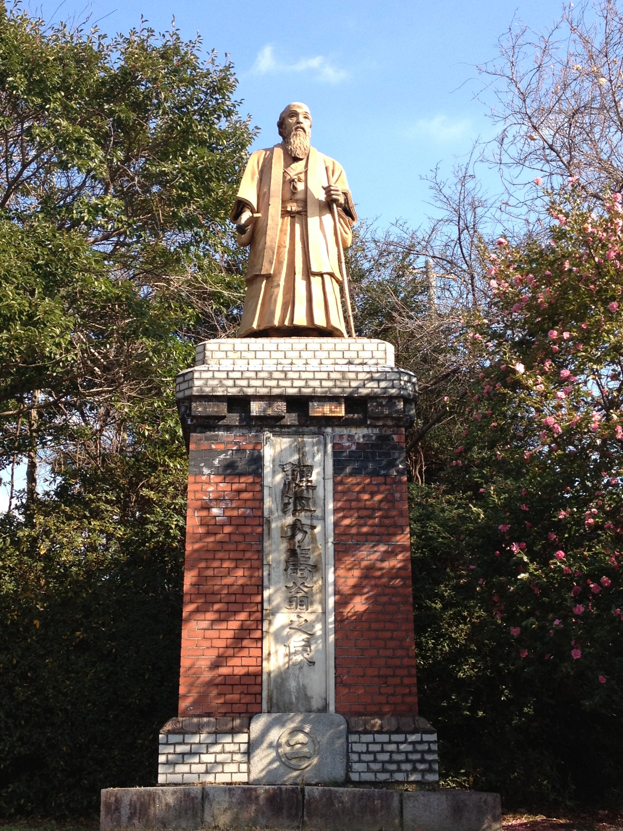 鯉江方寿の像です。 平野霞裳（1873～1938）作 （1914）